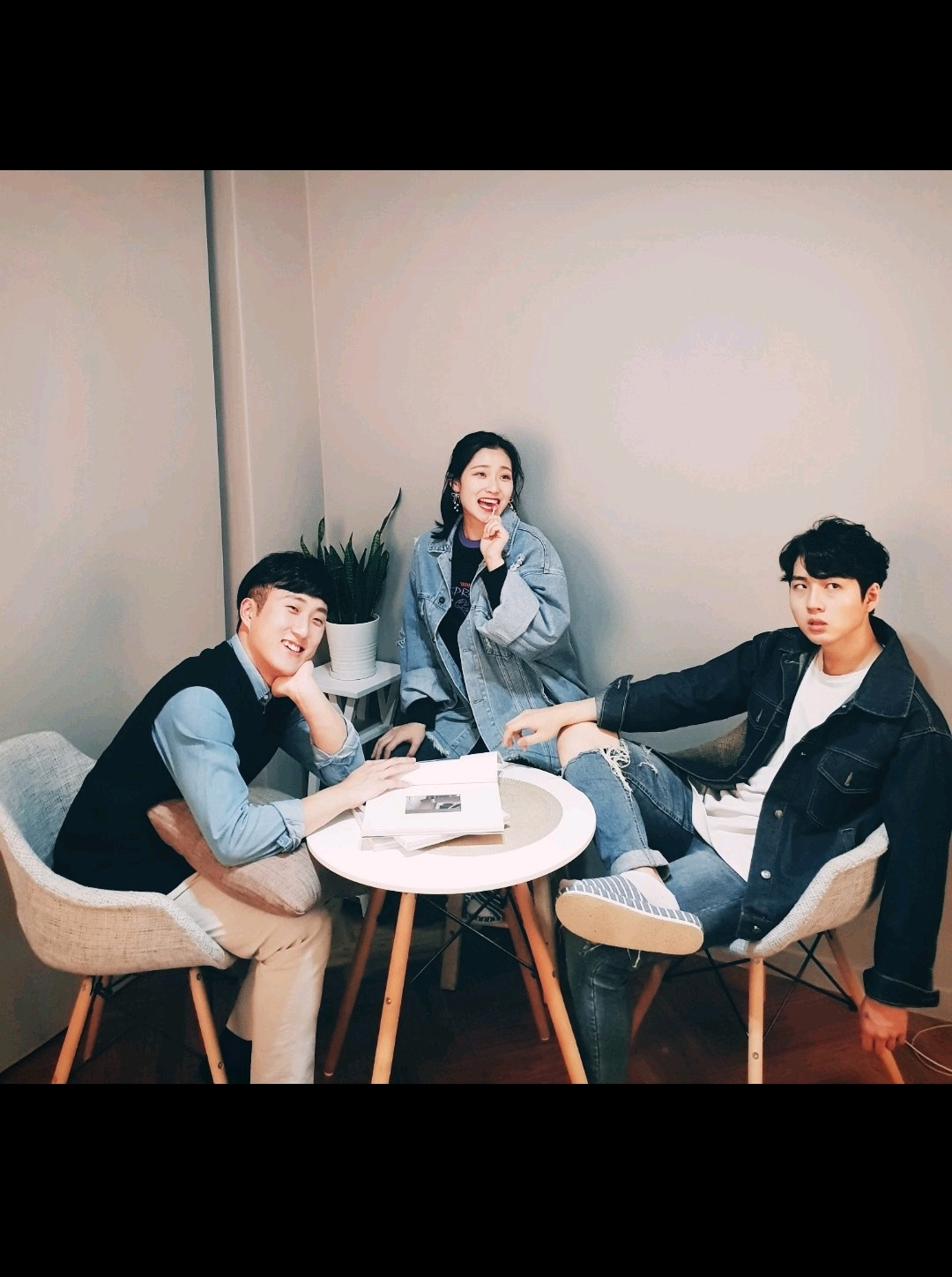 멜로그루 프로필사진